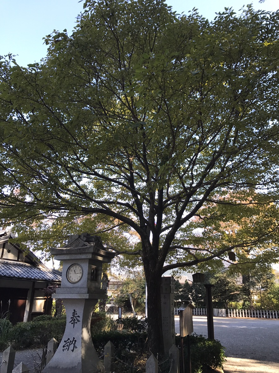 滋賀県近江八幡市の沙沙貴神社にあるなんじゃもんじゃ。